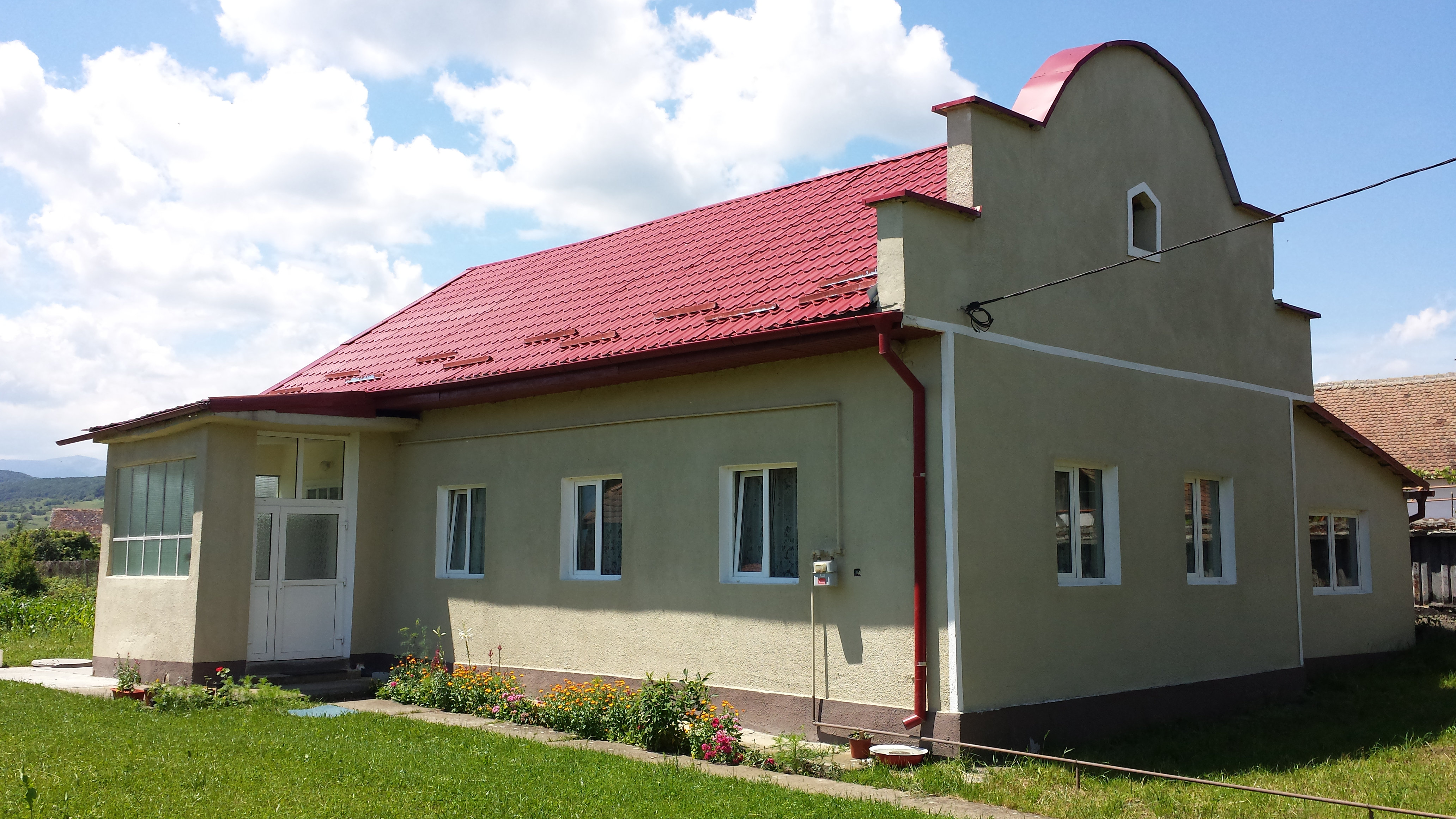 Gebaut um 2000-2015